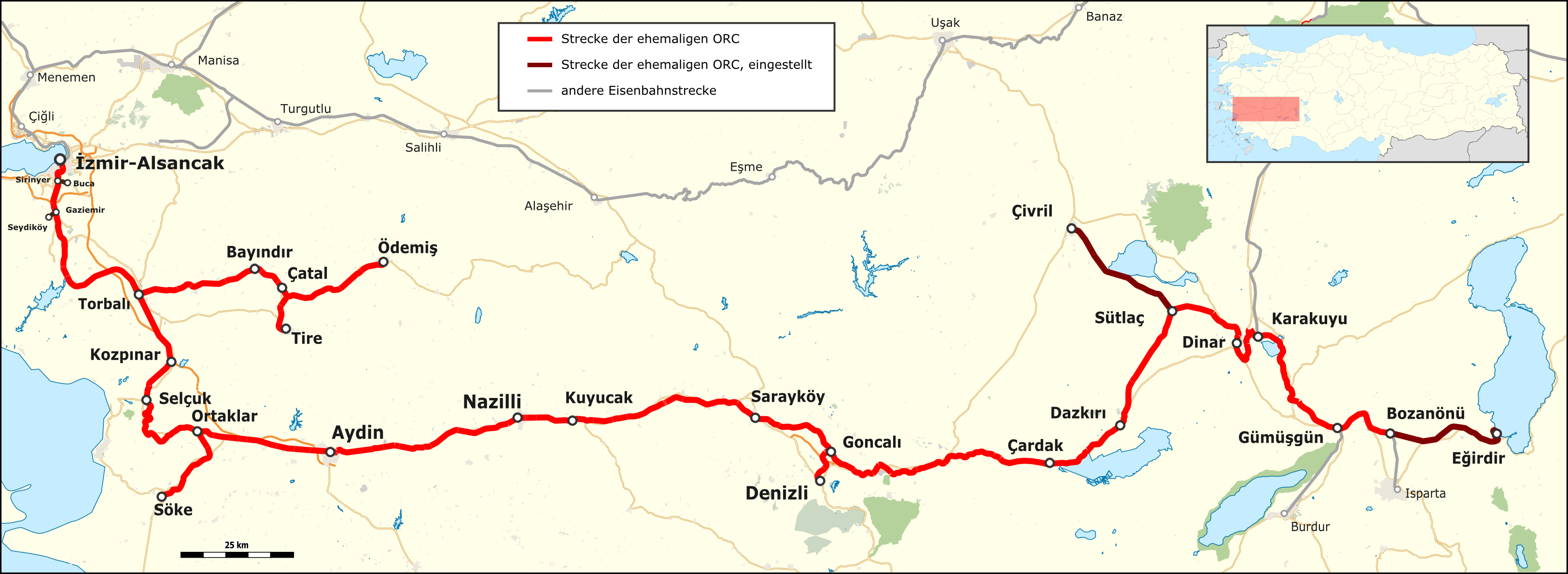 Karte der Ottoman Railway Company im Zustand von 2015